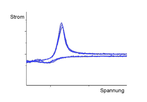 Zyklovoltammogramm einer KCN-Lösung